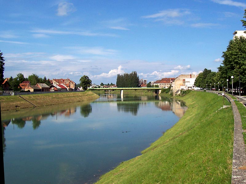 Kupa kod Karlovca